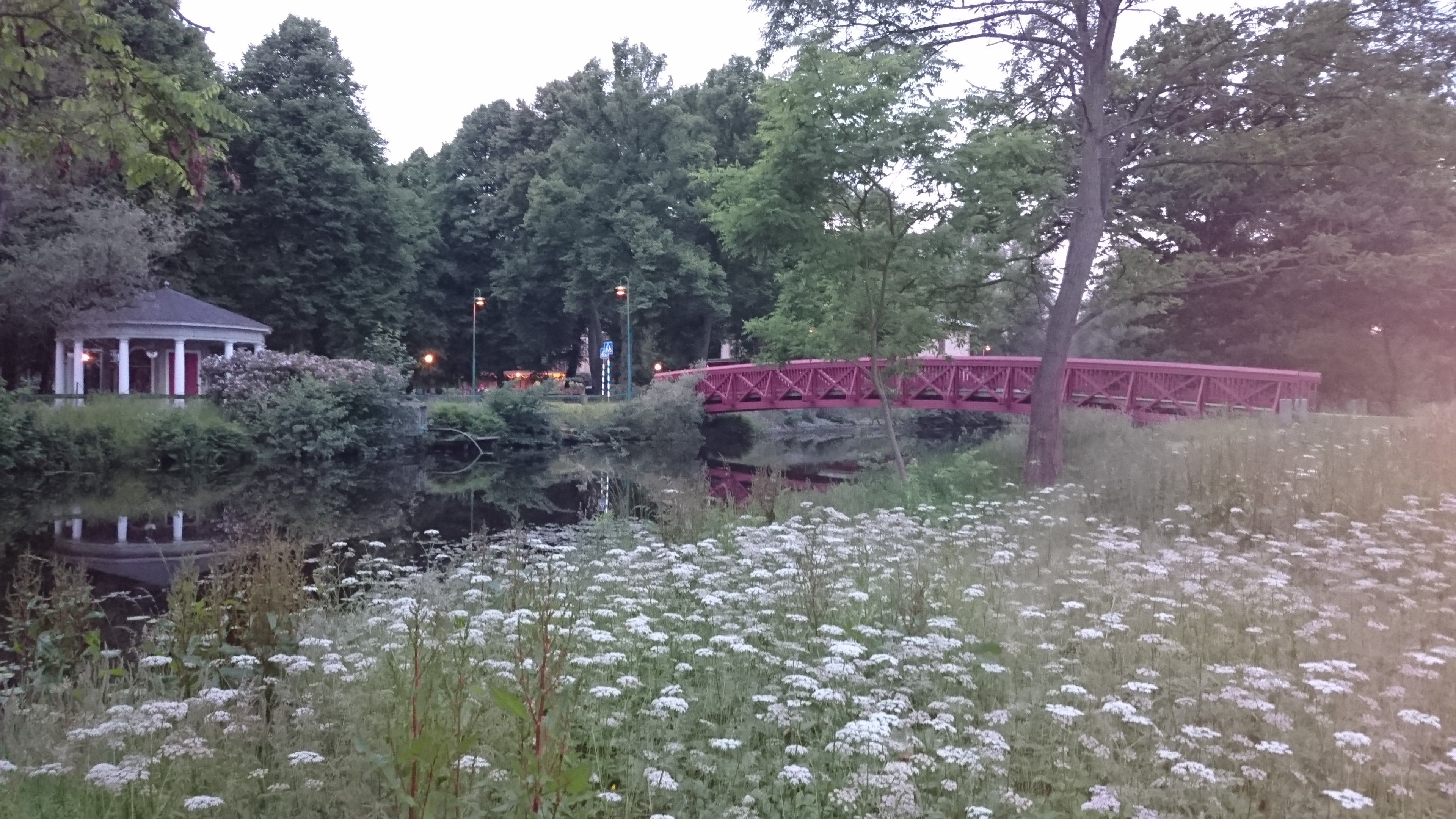 Schopfheimbron 2017 med Brunnskällan till vänster i bild.